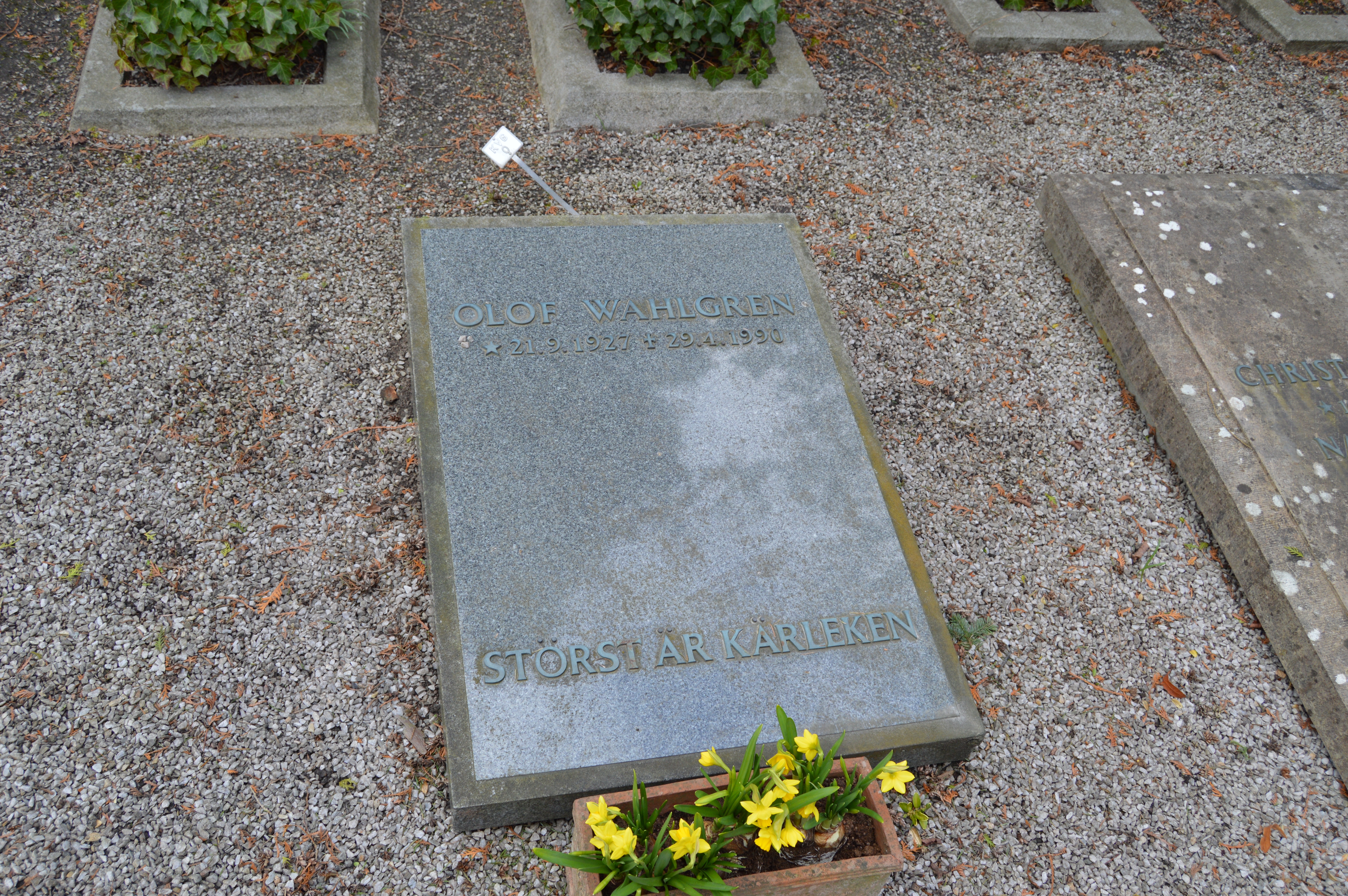 Olof Wahlgrens (1927-1990) grav på Östra kyrkogården i Lund.